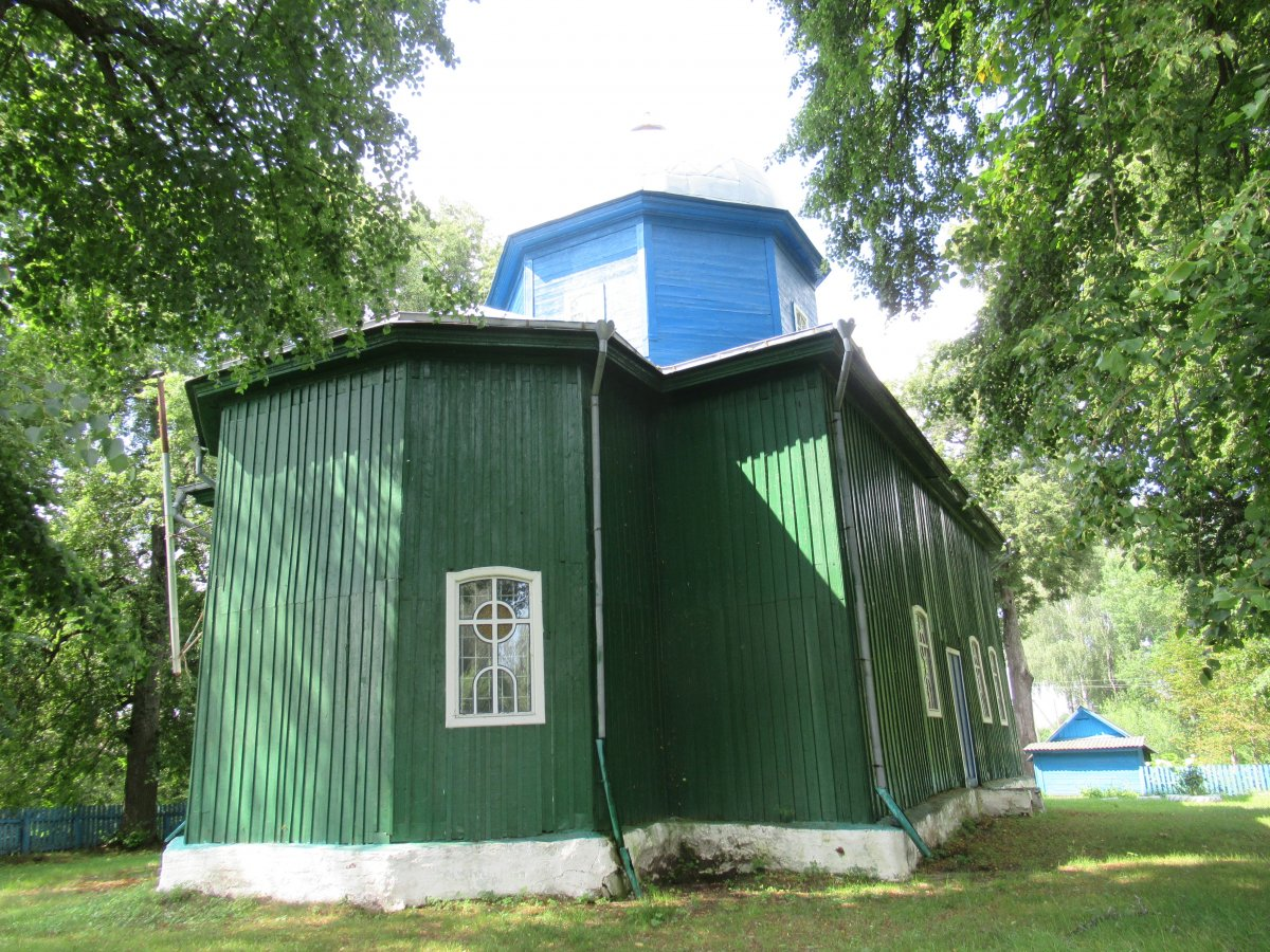 Свята-Ільінская царква ў Слаўным Мсціслаўскага раёна Магілёўскай вобласці